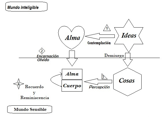 Proceso de conocimiento tal como lo entendía Platón